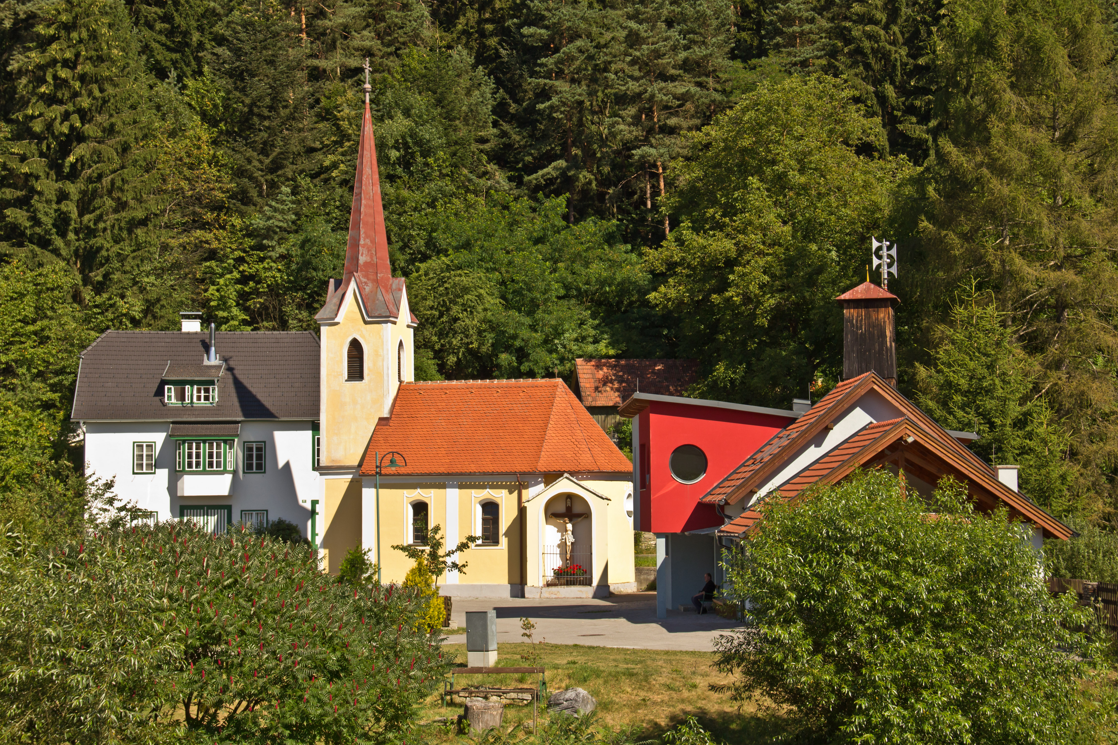 Das Glockenhaus der Ortskapelle Mariae Krönung wurde 1739 urkundlich erwähnt. 1761 erfolge der Anbau der schlichten Kapelle.